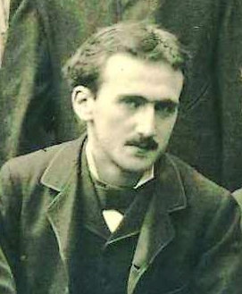 Henri Bergson sur une photo de groupe (détail). Promotion littéraire de l’École Normale Supérieure (rue d'Ulm, Paris (5e arrond.). Photographe Pierre Petit. Fonds photographique de l'école : PHO D/2/1878/5.